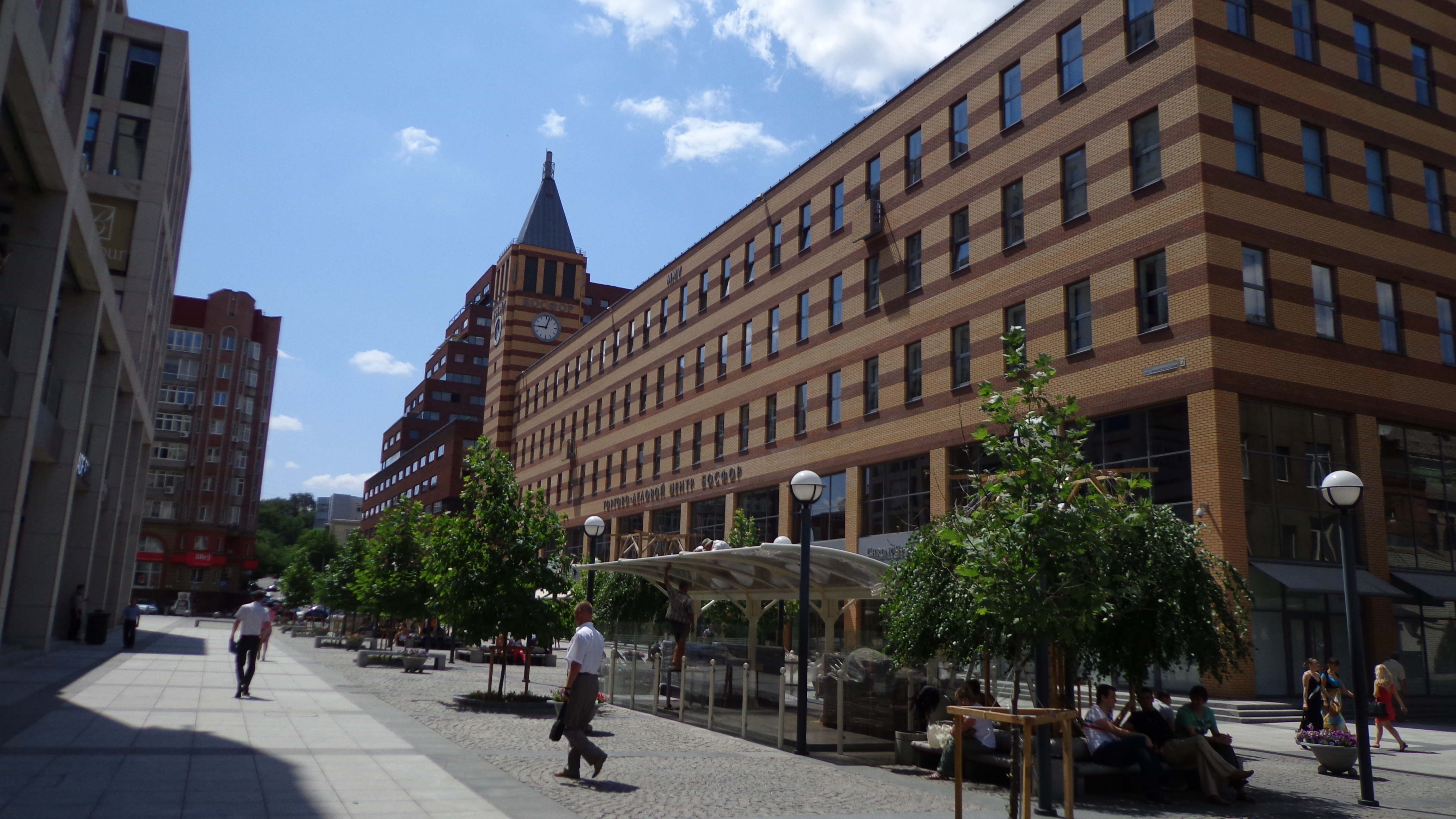 Shopping- und Buisnesscenter "Bosfor"